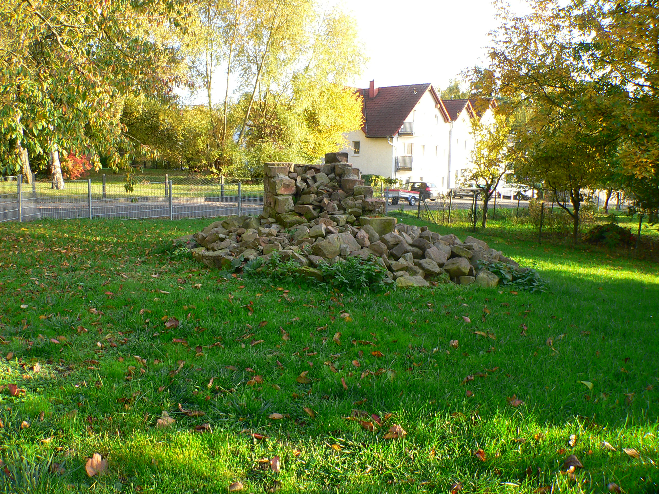 Zusammengetragene Reste der Hofburg in Buseck im Landkreis Gießen, Hessen, Deutschland. Als Denkmal auf einem Gemeindegrundstück unweit des ehemaligen Standorts der Burg.